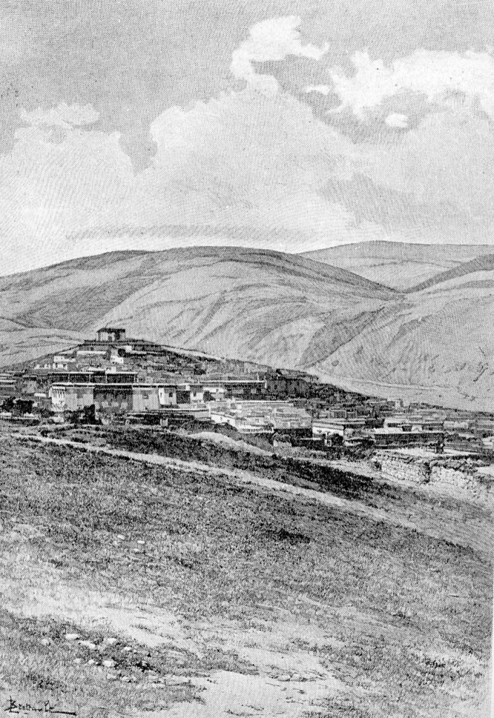 Litang 1840s